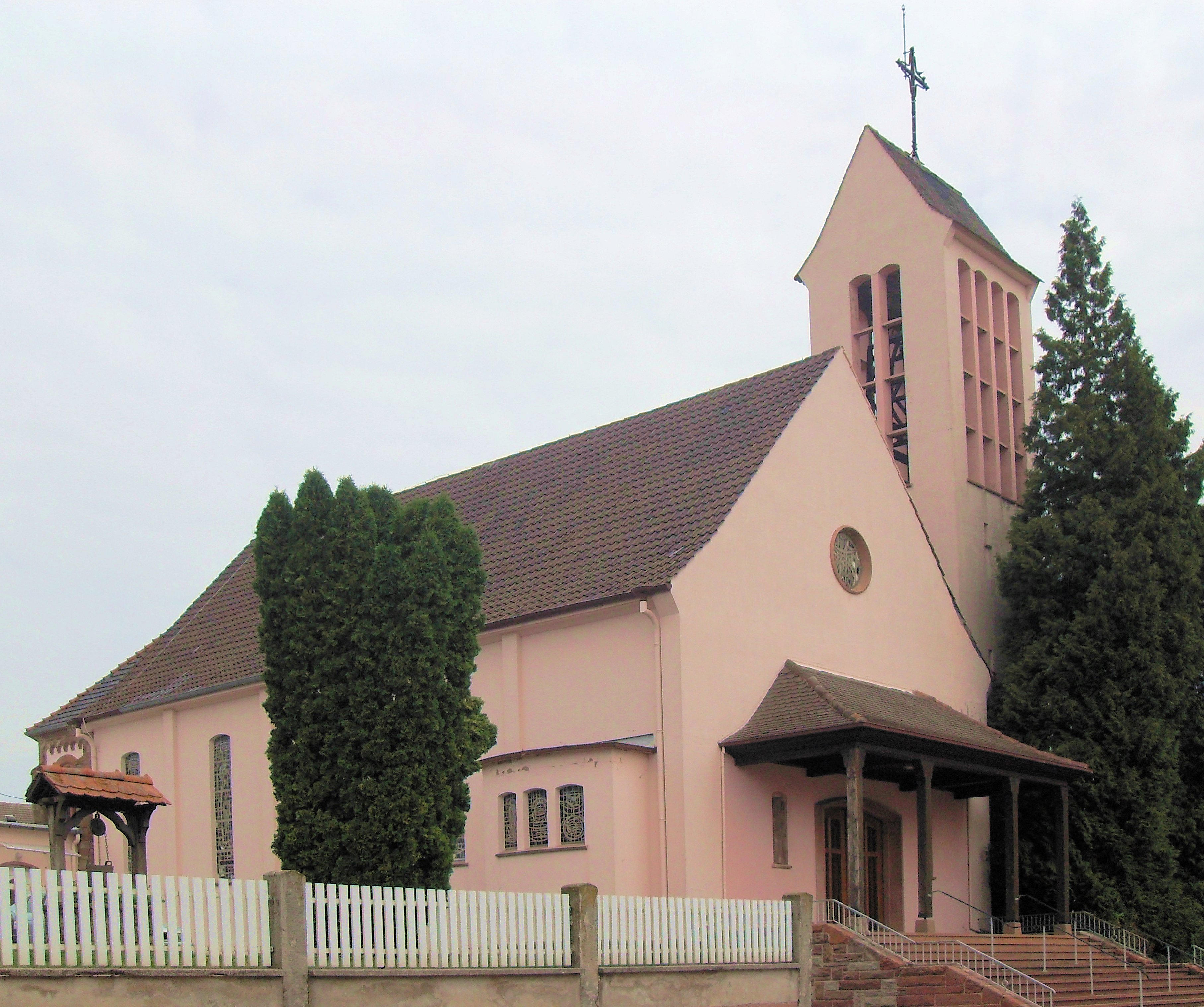 L'église Saint-Ulrich à Buhl